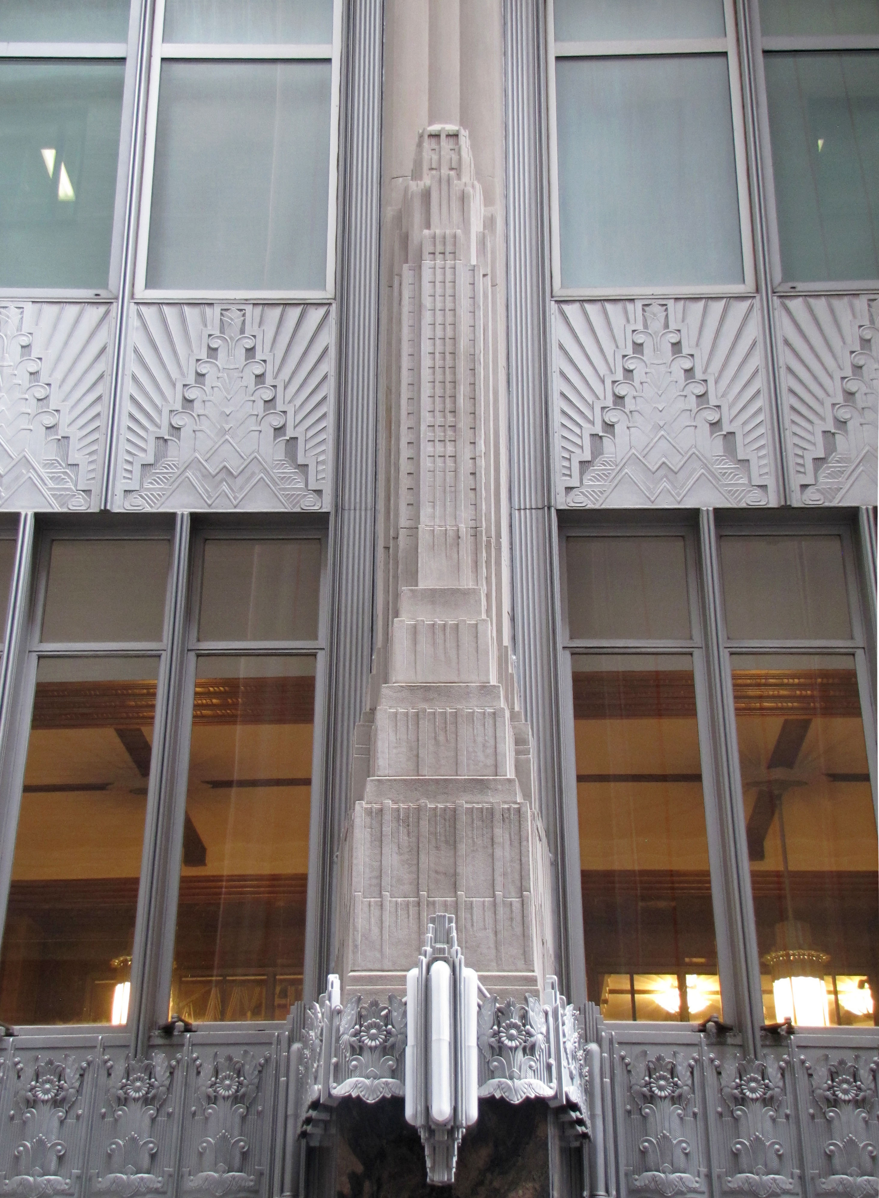 Site: 70 Pine